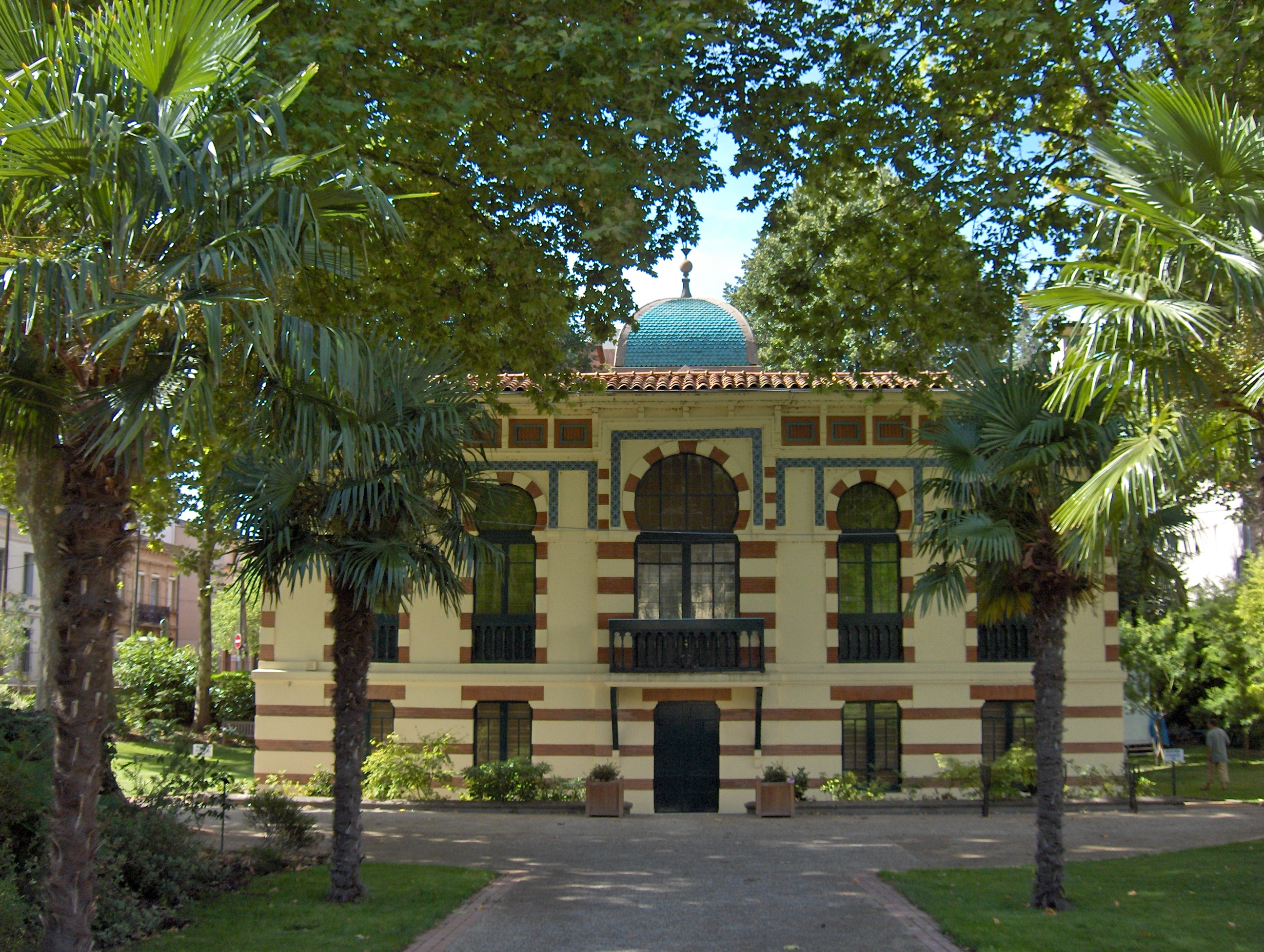 Le musée Georges Labit à Toulouse (Haute-Garonne, France).